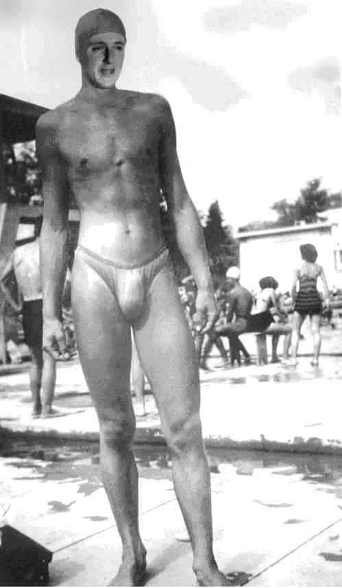 Никита Дмитриевич Лобанов-Ростовский